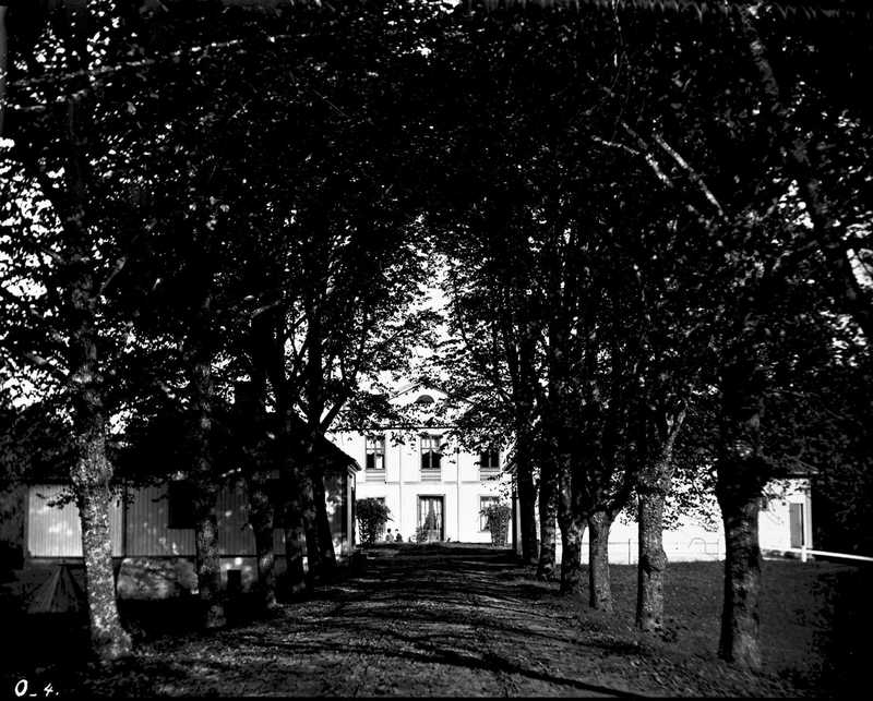 Dronninghavn, Bygdøy